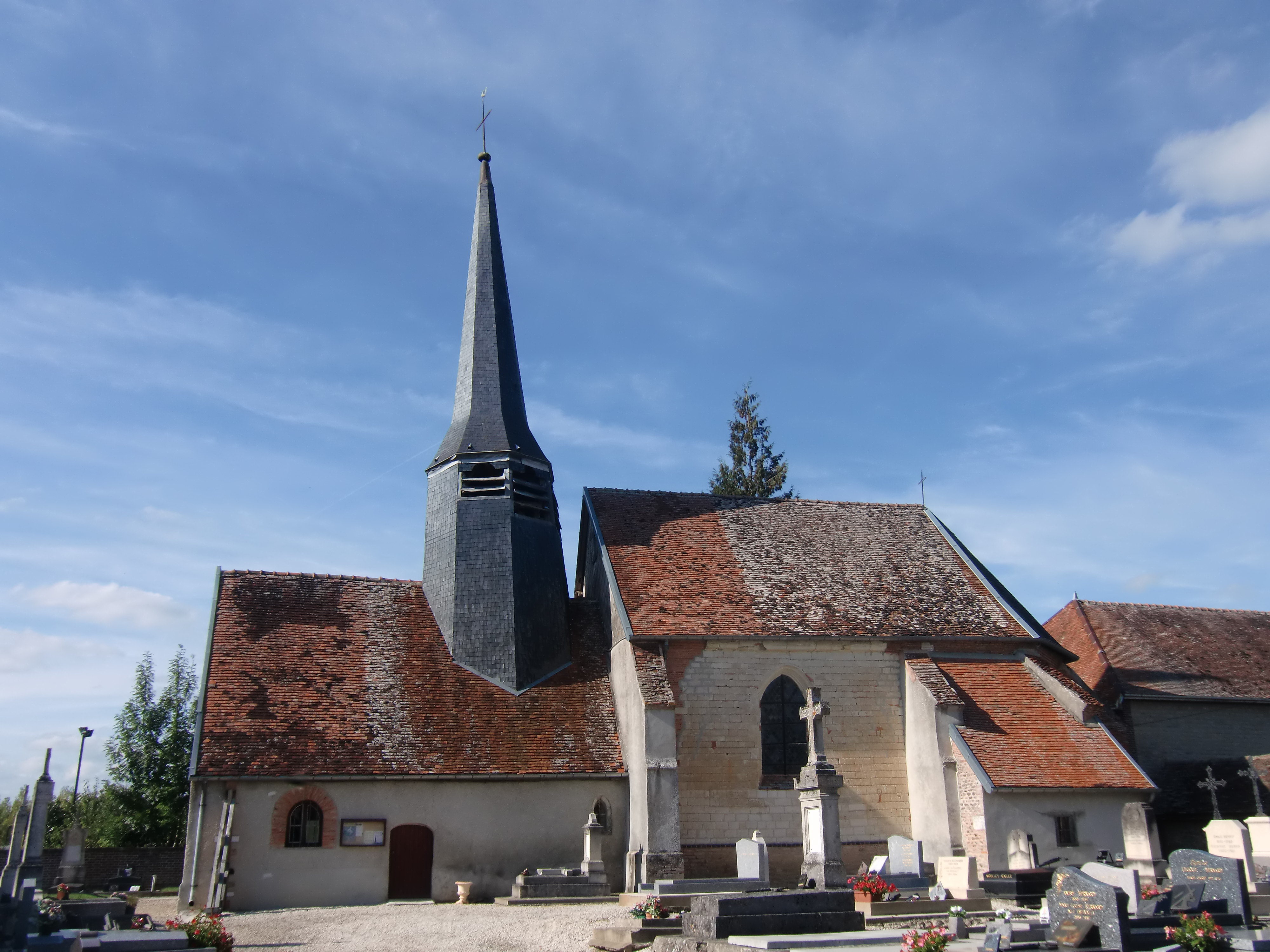 Eglise de Daudes (Commune de Montaulin - Aube - Champagne - France)